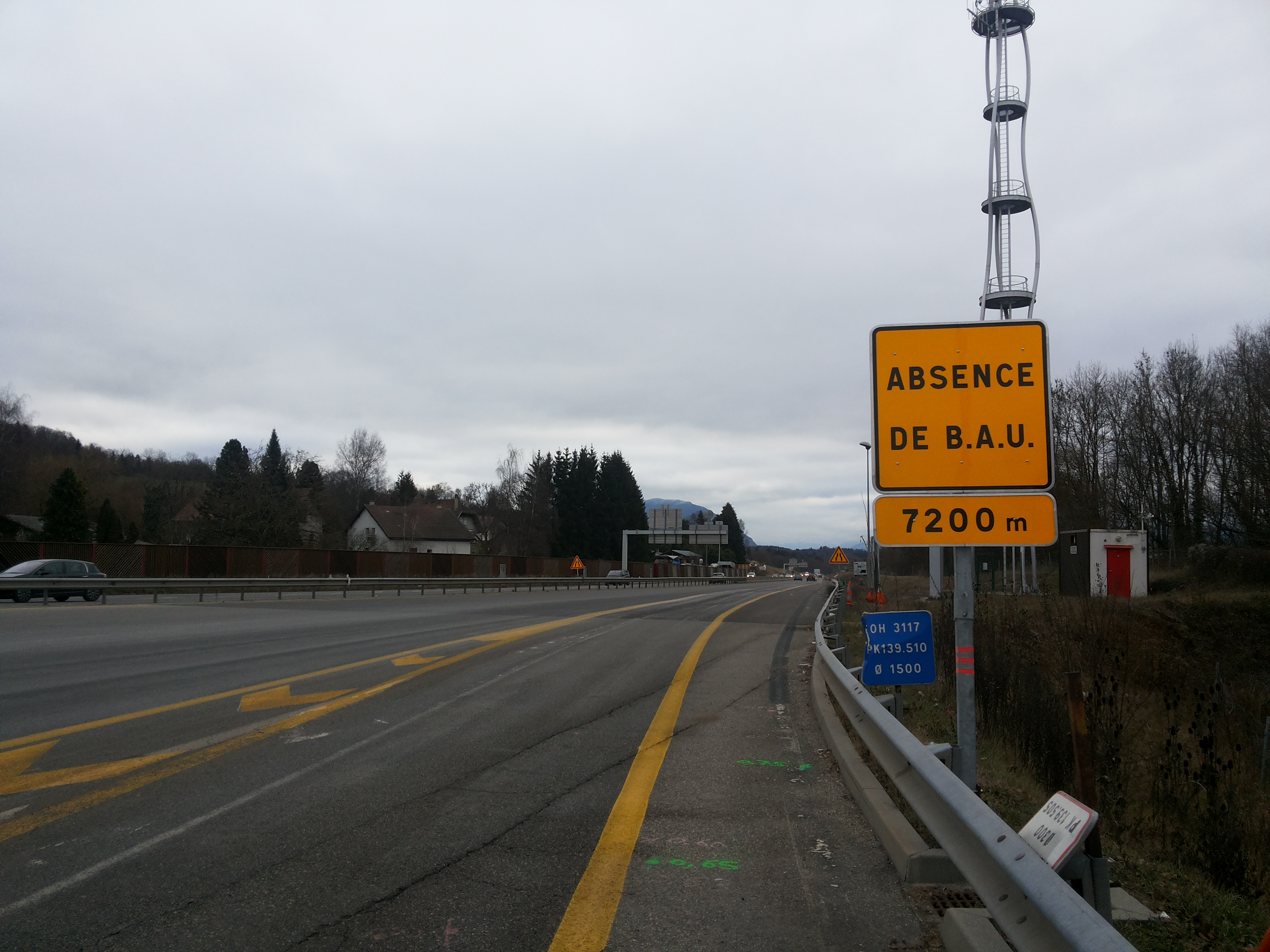 Panneau KC1 absence de B.A.U. avec panonceau KM1 7200 m, autoroute A41 à la sortie du péage de Saint-Martin-de-Bellevue, Haute-Savoie, France.